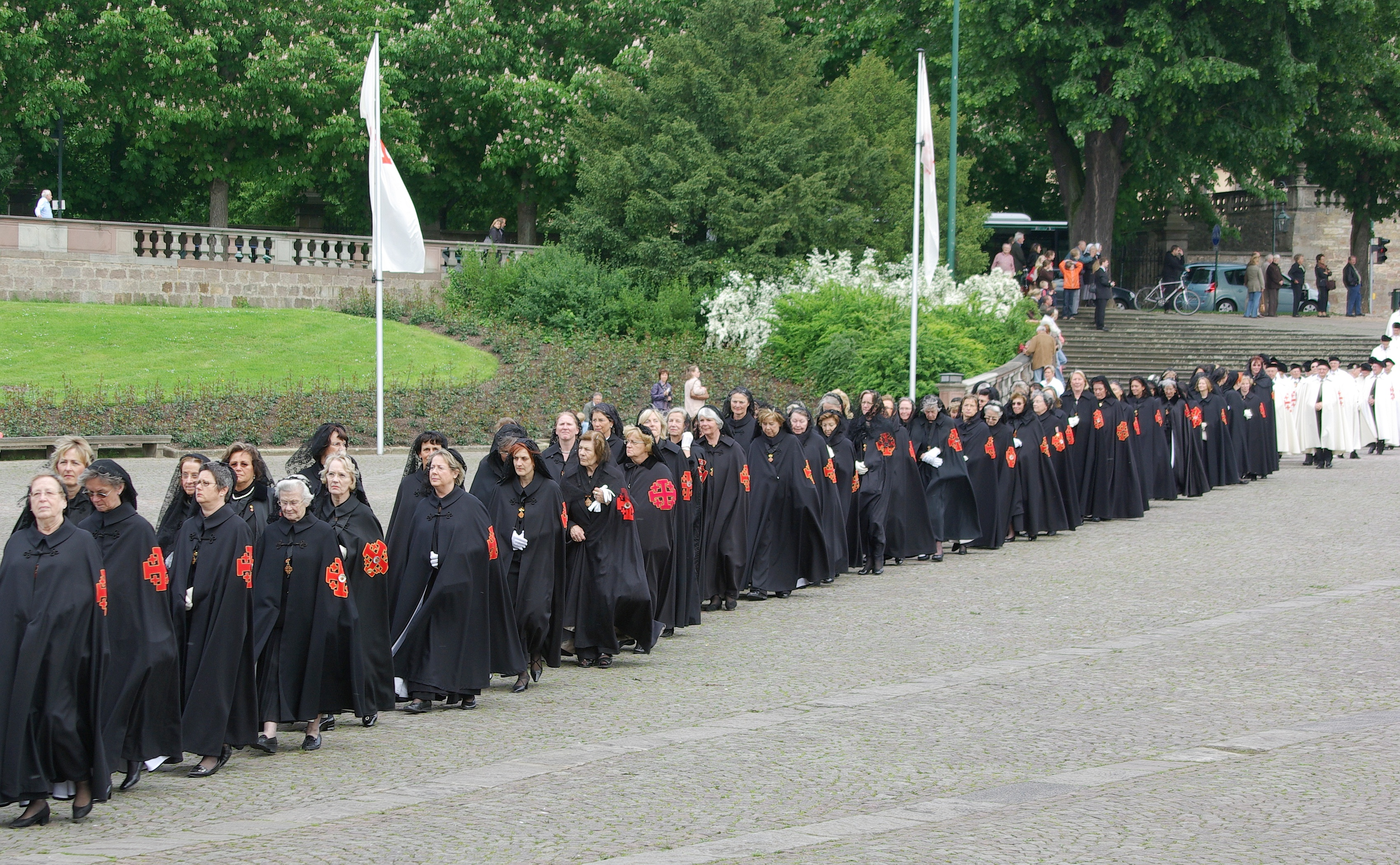 Einzug zur Investitur der Deutschen Statthalterei des Ritterordens am 16.5.2009 in den Hohen Dom zu Fulda (Germany)